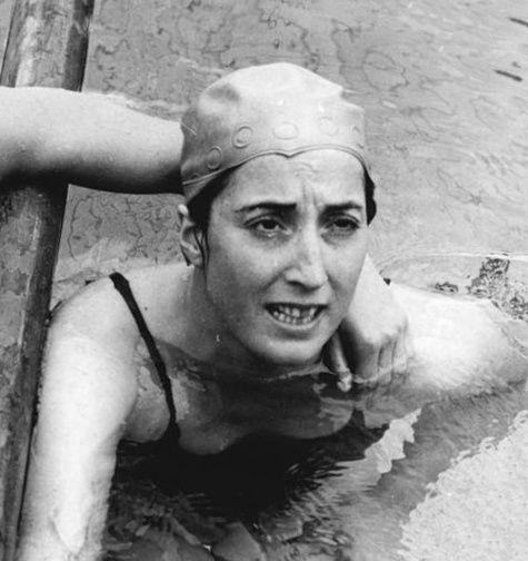 Jutta Langenau